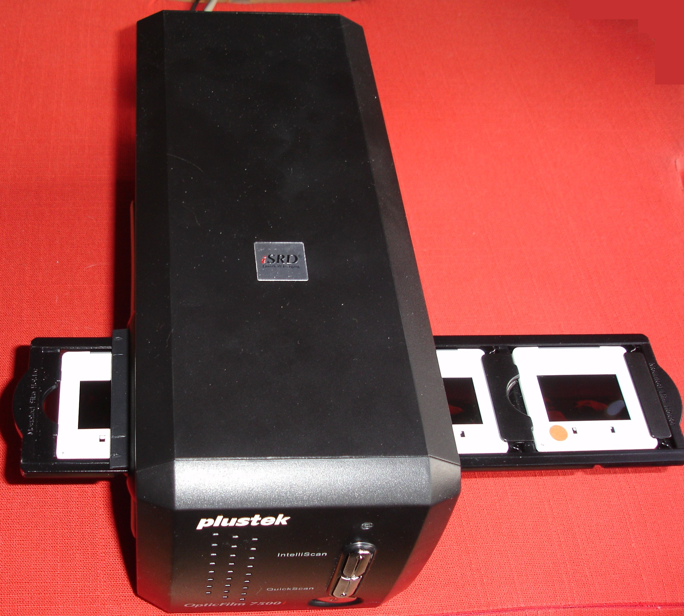 Plustek OpticFilm 7500i slide scanner